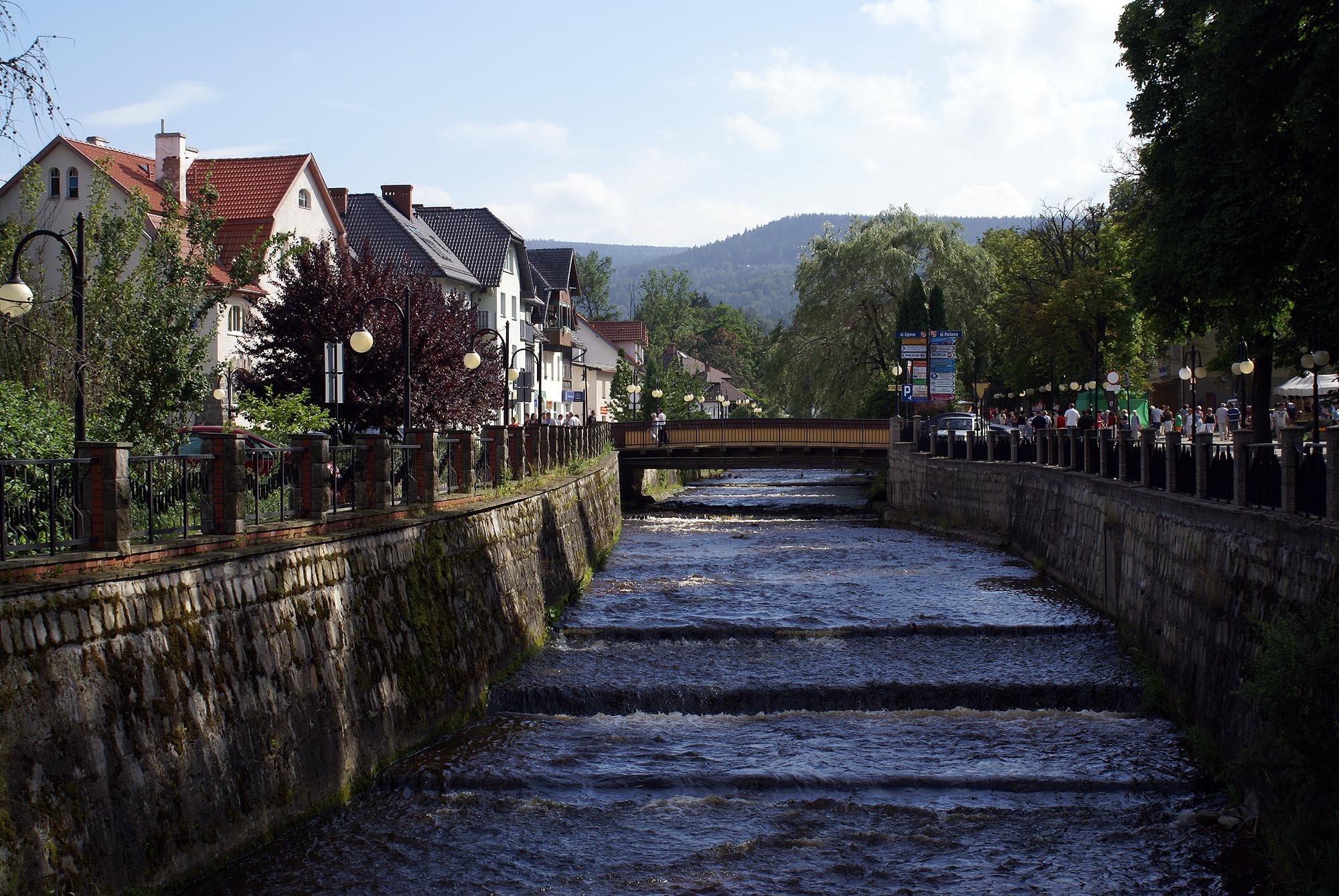 Polanica-Zdrój, historyczny układ urbanistyczny miasta, XIV, XX